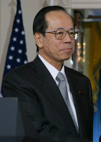 Japanese Prime Minister Yasuo Fukuda